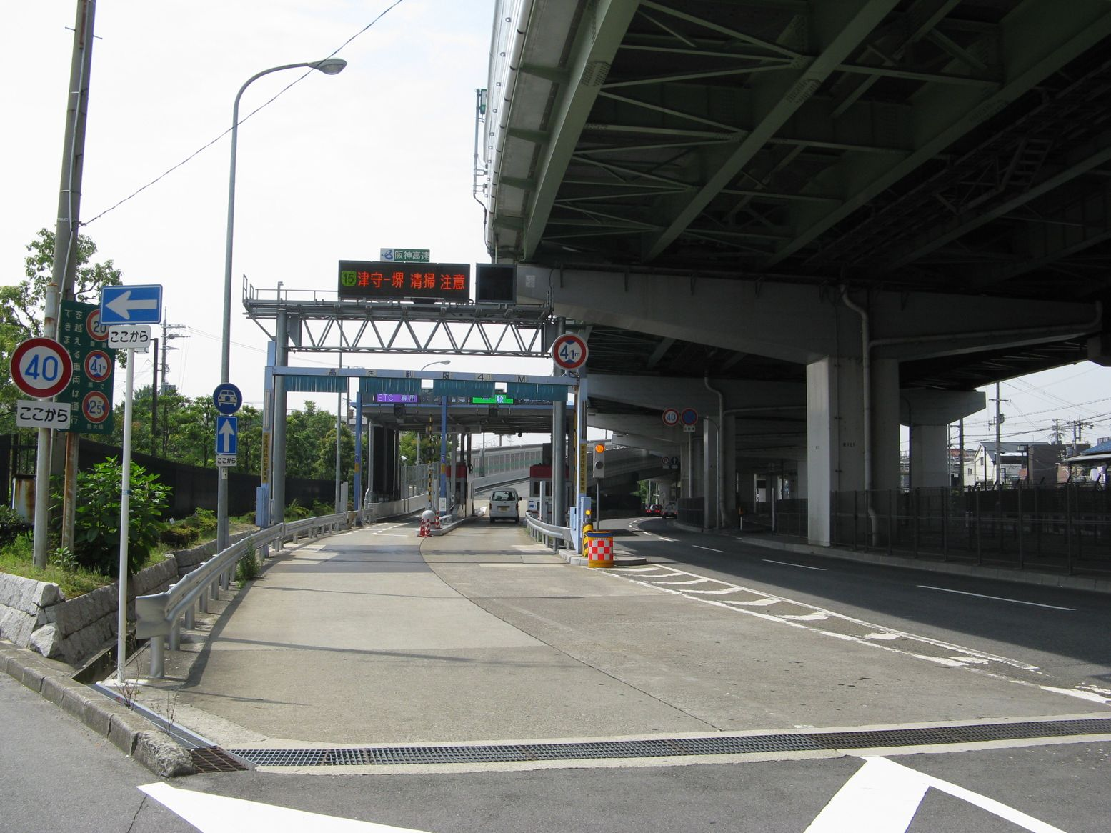 阪神高速津守出入口 堺方面入口を南望